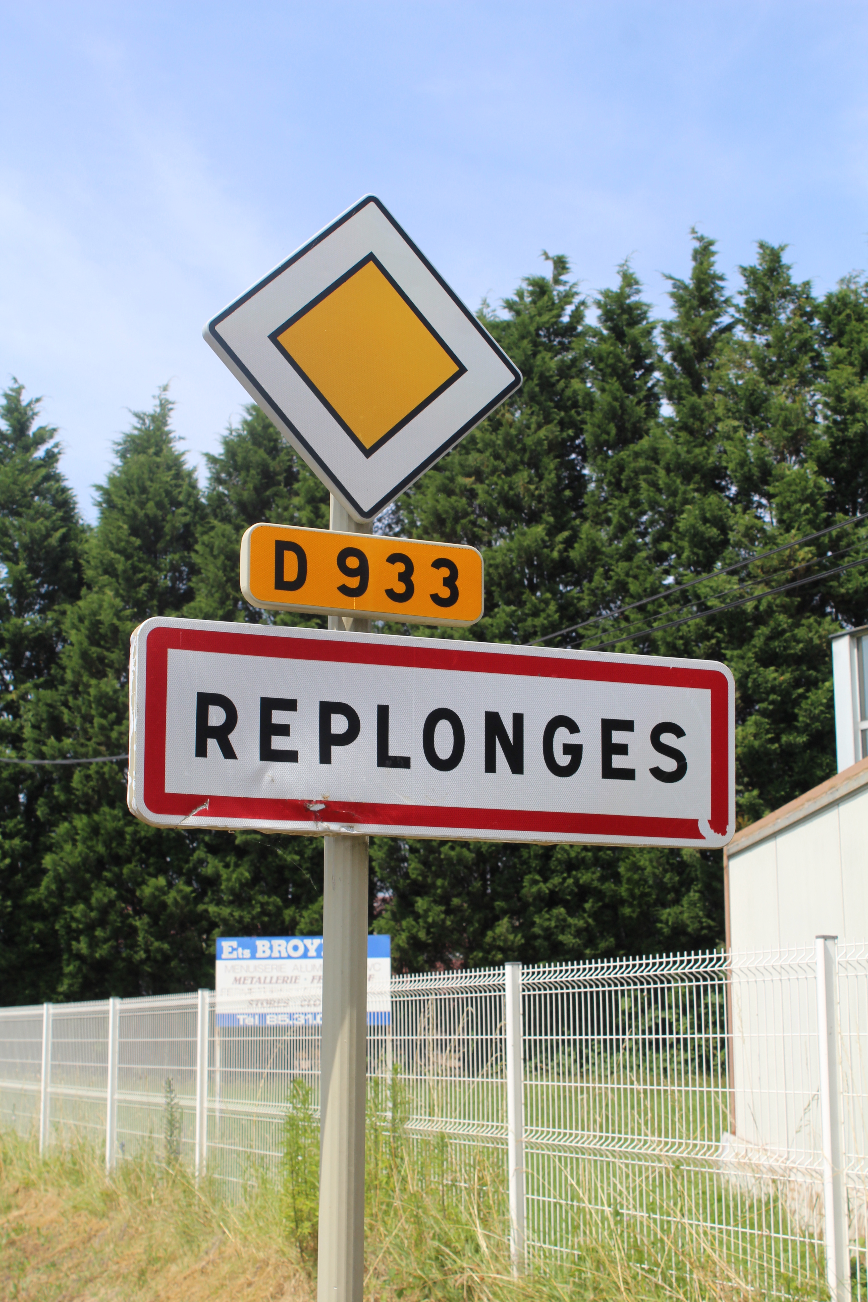 Panneau d'entrée à Replonges depuis la zone d'activités Combe de Veyle.